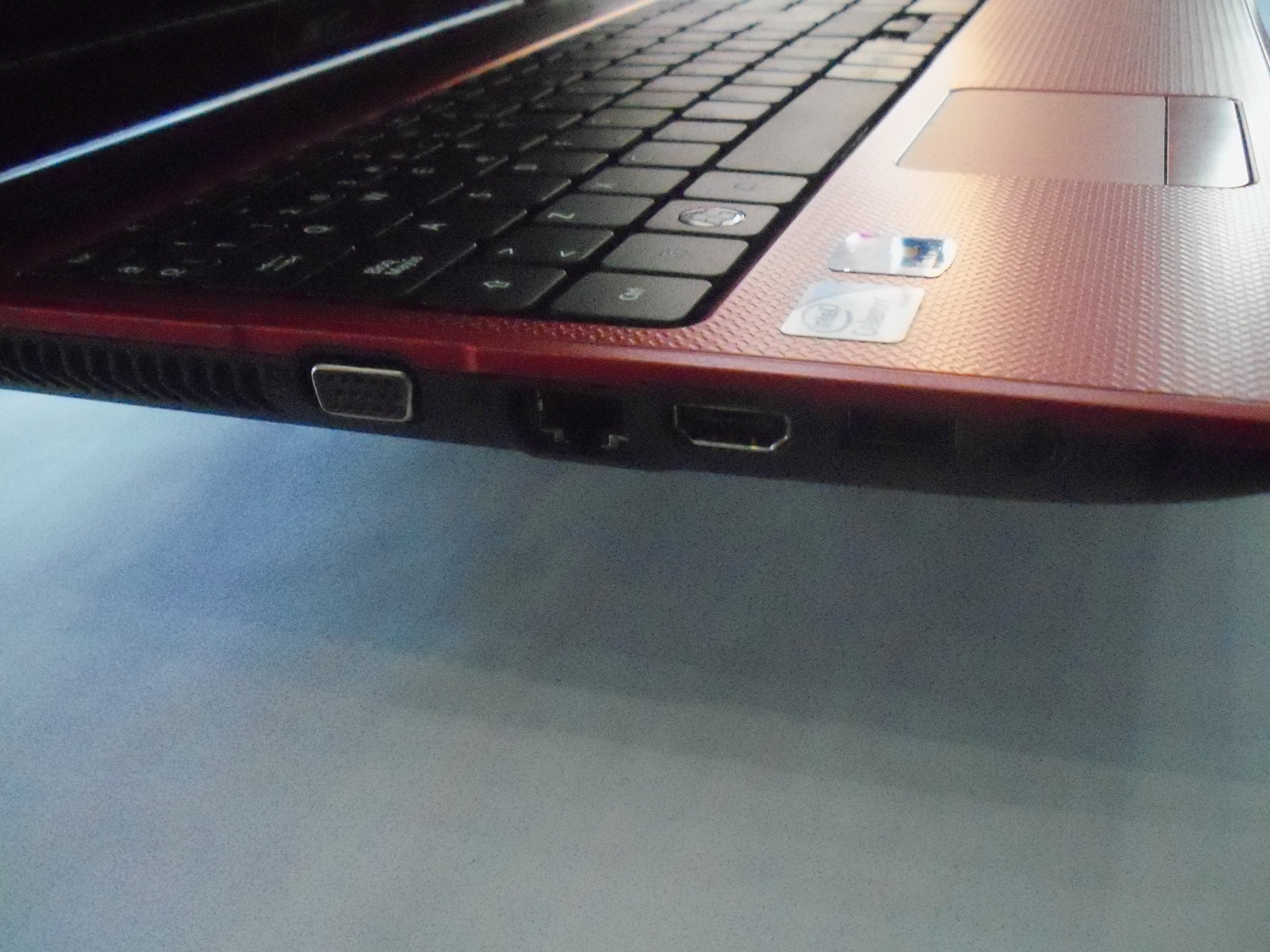 Portátil Acer Aspire 5336